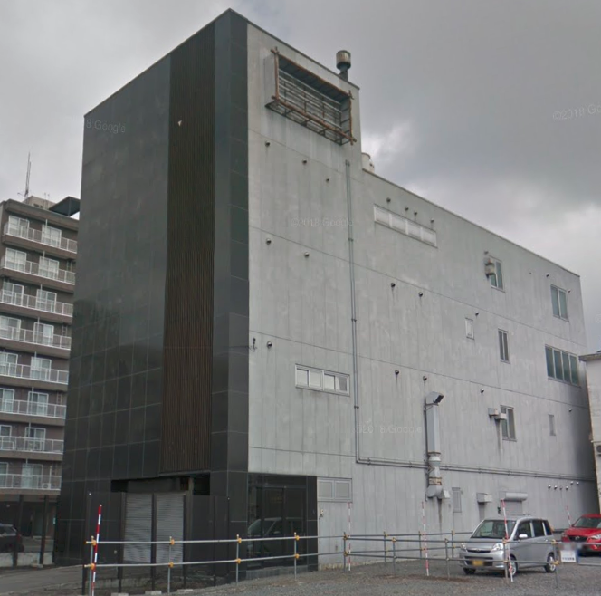 「株式会社 旭導総業」と偽装されている旭導会事務所